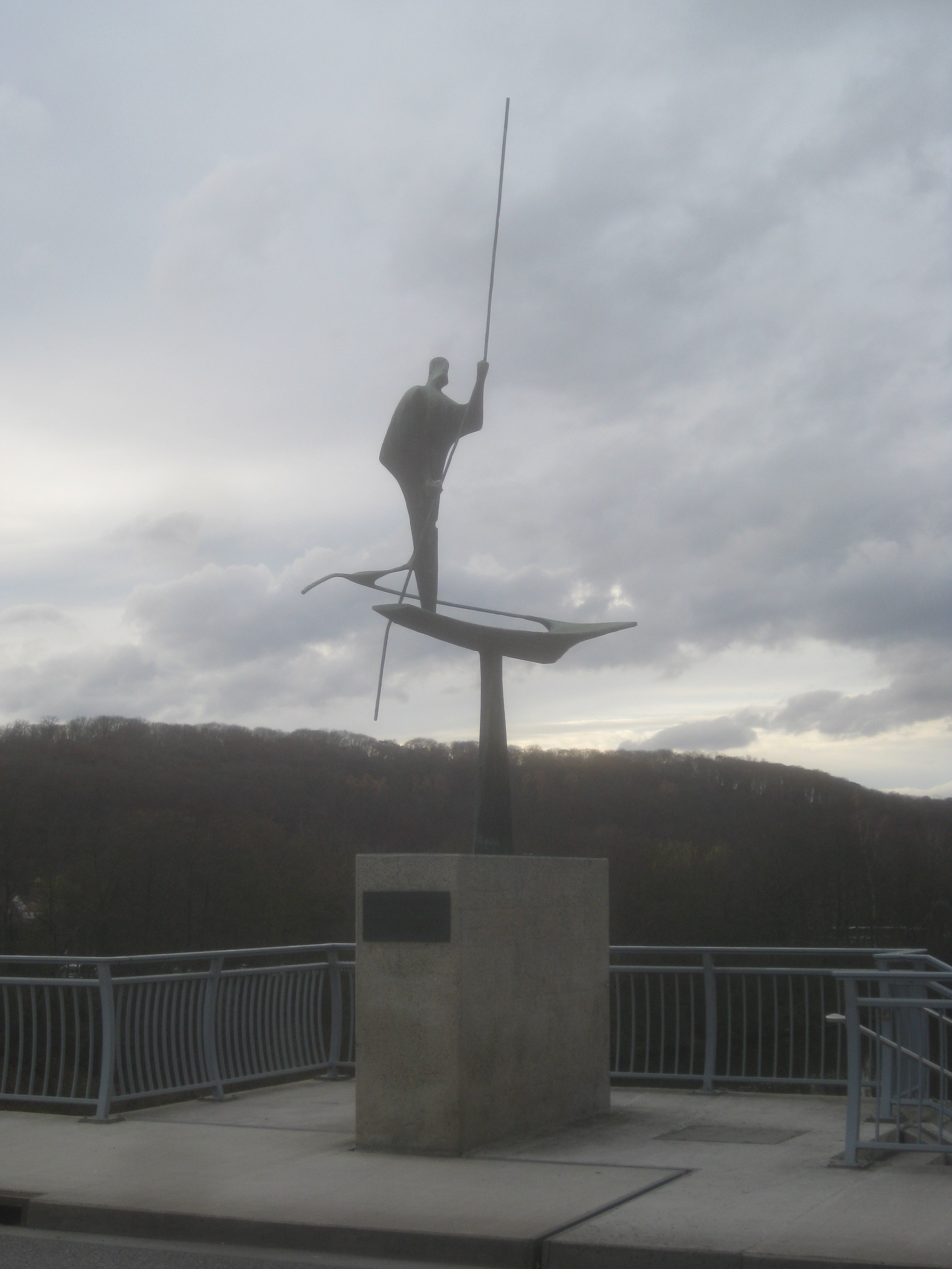 Großer Fährmann oder Mann im Nachen, Plastik von Bernhard Heiliger, Bronzeskulptur auf Betonsockel, 1956, Oberesslingen, Dieter-Roser-Brücke. Inschriftentafel am Sockel: „Dieter-Roser-Brücke 1911–1975, Oberbürgermeister der Stadt Esslingen am Neckar 1948–1966“.